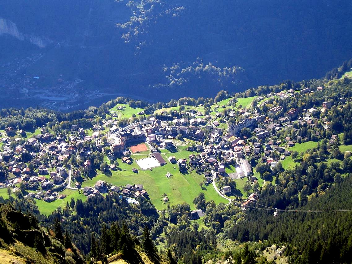 Wengen vom Männlichen aus gesehen